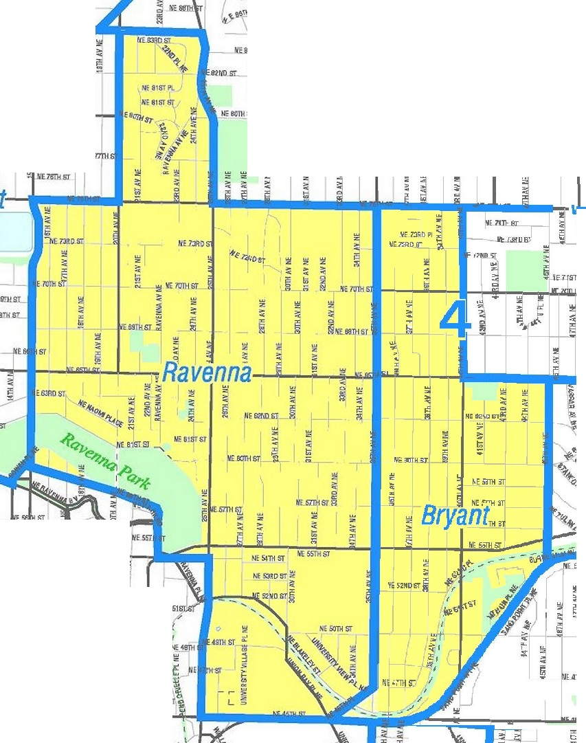 kunfandaĵo en komunejaj mapoj pri la du koncernaj kvartaloj